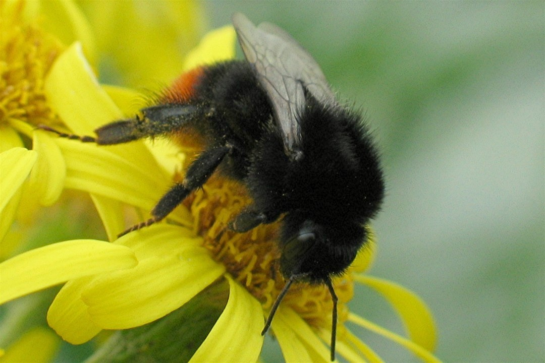 Steinhummel (Bombus lapidarius)